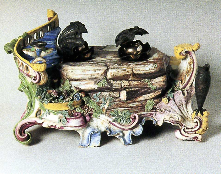 Grande calamaio in porcellana in forma di architettura da giardino. Ginori a Doccia 1750 -1760 c